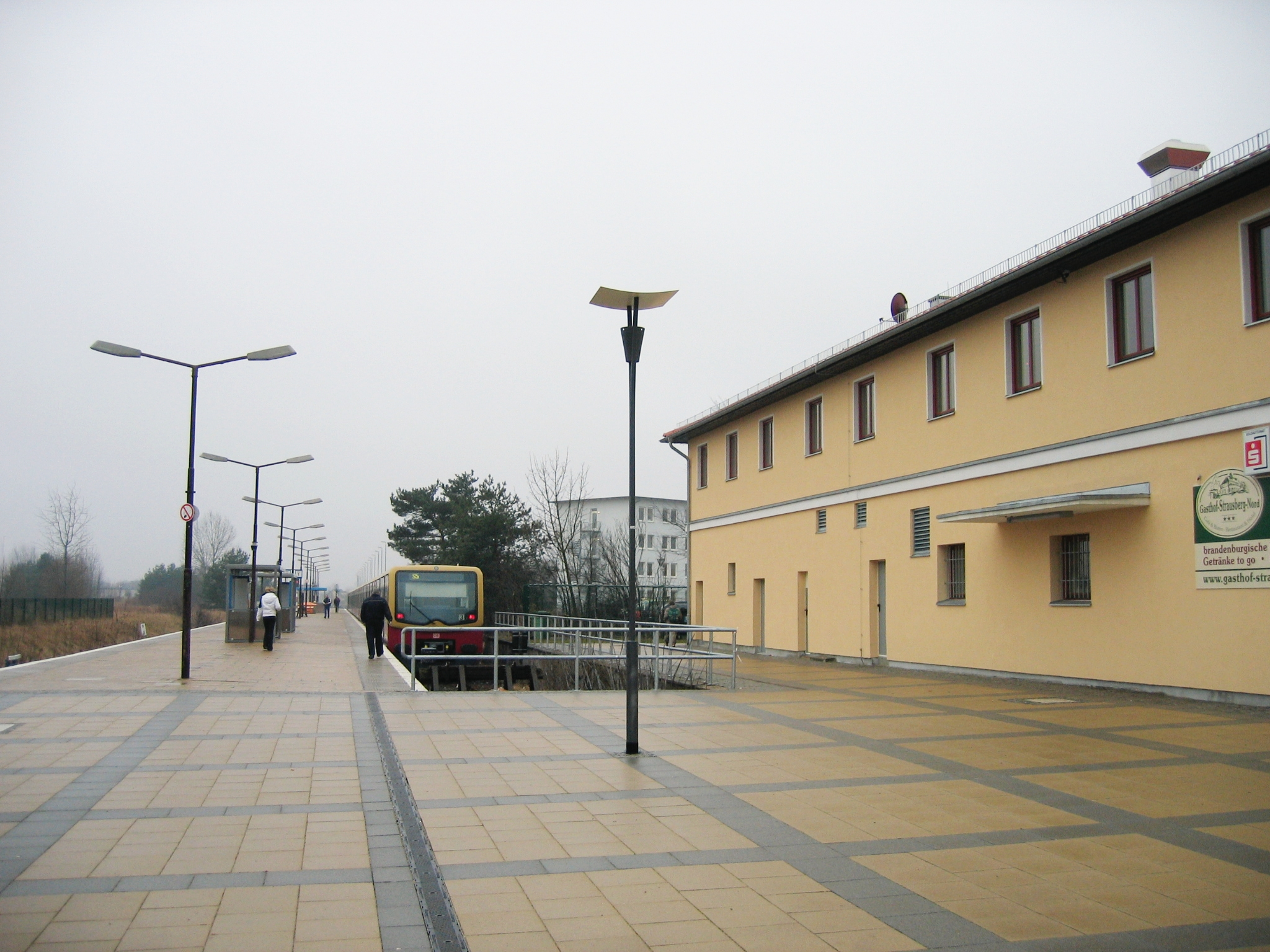 S-Bahnhof Strausberg Nord